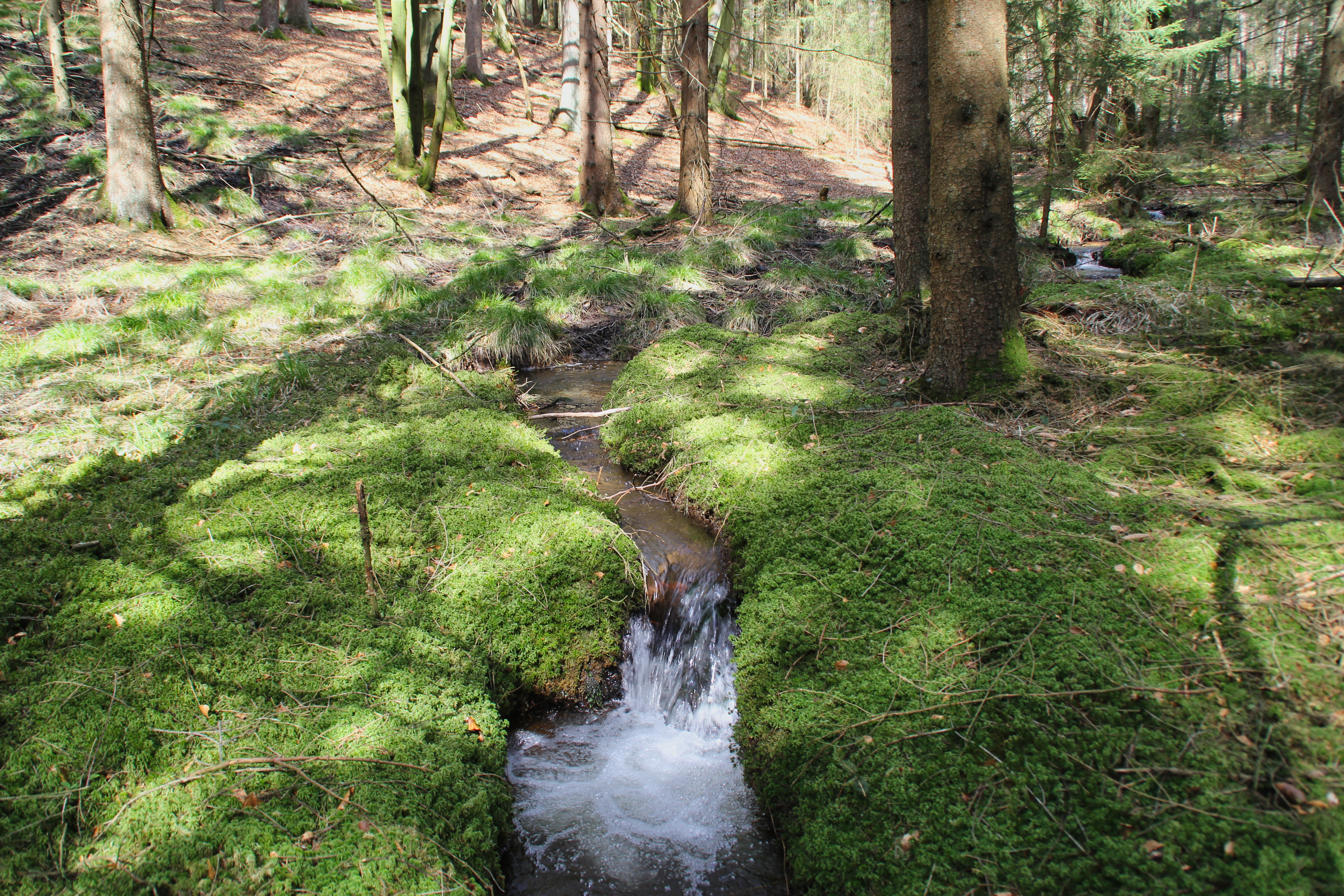 Die Speckkahl im Naturschutzgebiet Amphibienfreistätte Speckkahl bei Sommerkahl, Bayern